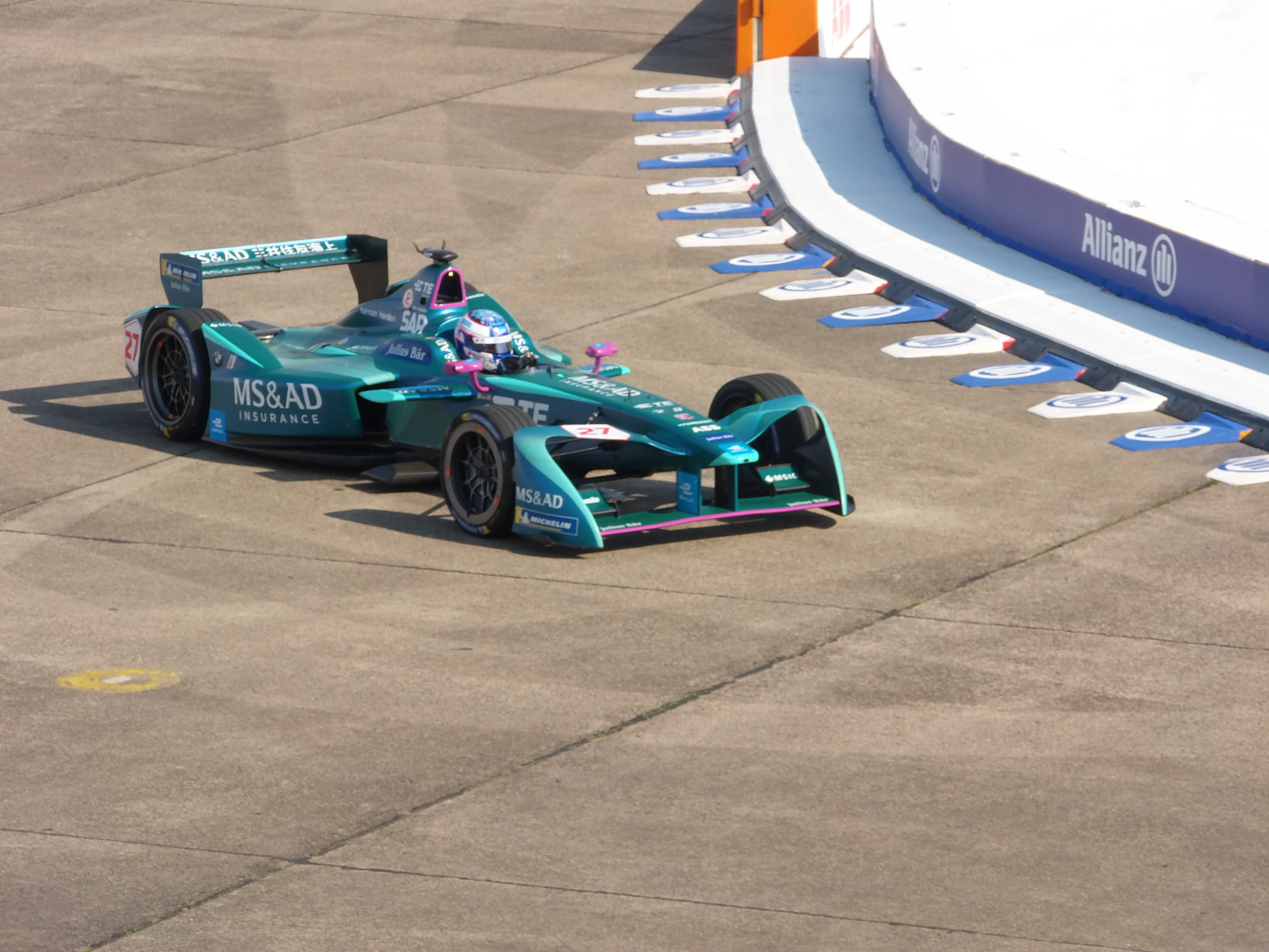 Stéphane Sarrazin im Andretti ATEC-03 beim Berlin E-Prix 2018